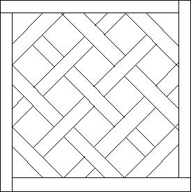 Patroon Versailles parket